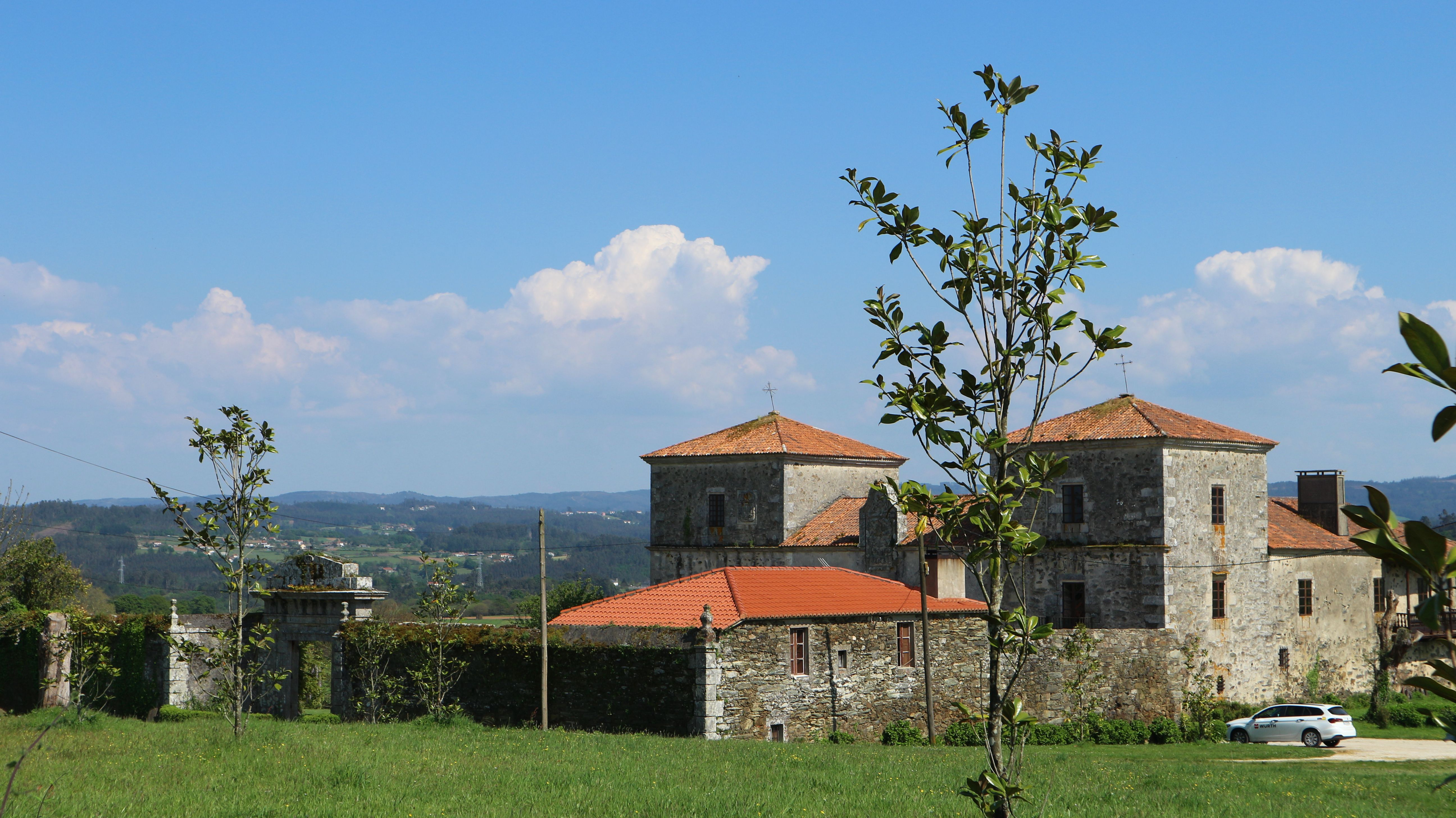 Pazo dos Quiroga, Mabegondo, Abegondo.